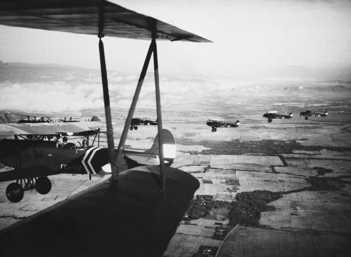 Foto. Een eskader Fokker vliegtuigen van het KNIL in de lucht